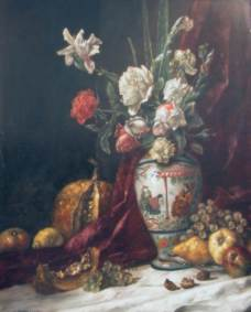 Caspar Augustin Geiger: Stilleben mit Vase